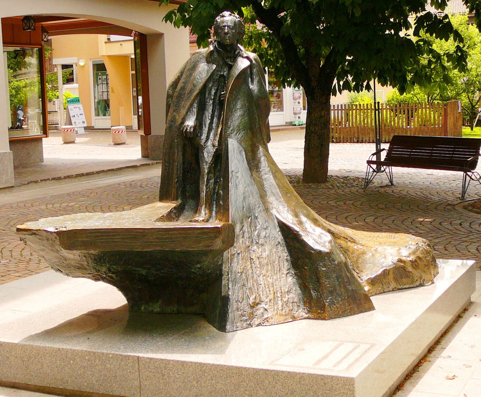 Socha Gustava Mahlera v Toblachu v Jižním Tyrolsku